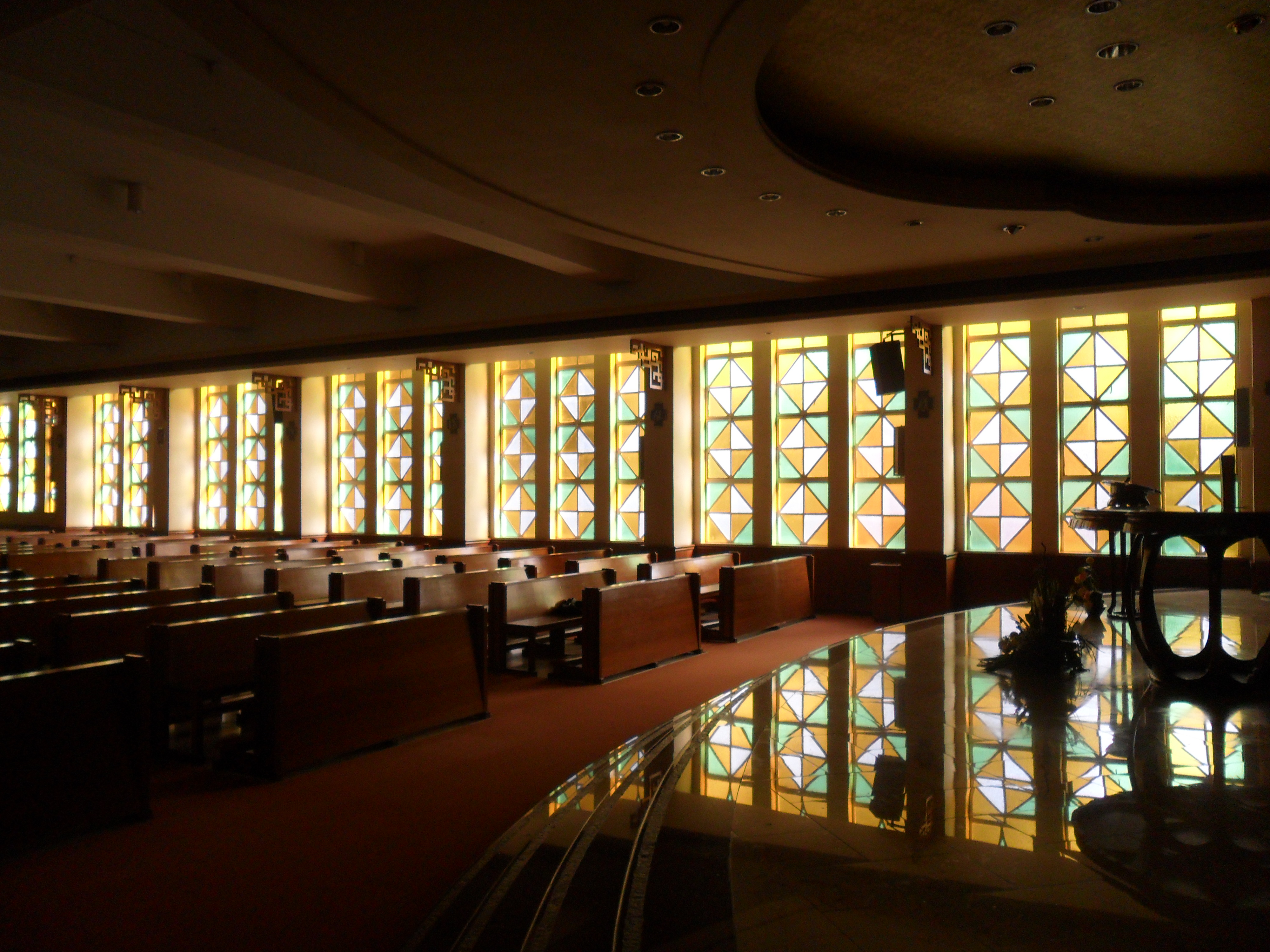 中文（香港）: 聖斯德望堂, 香港, 中國